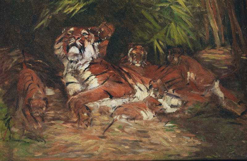 Tigerin mit ihren Jungen. Öl auf Karton, 27 x 42 cm, undeutlich signiert Karl Appel